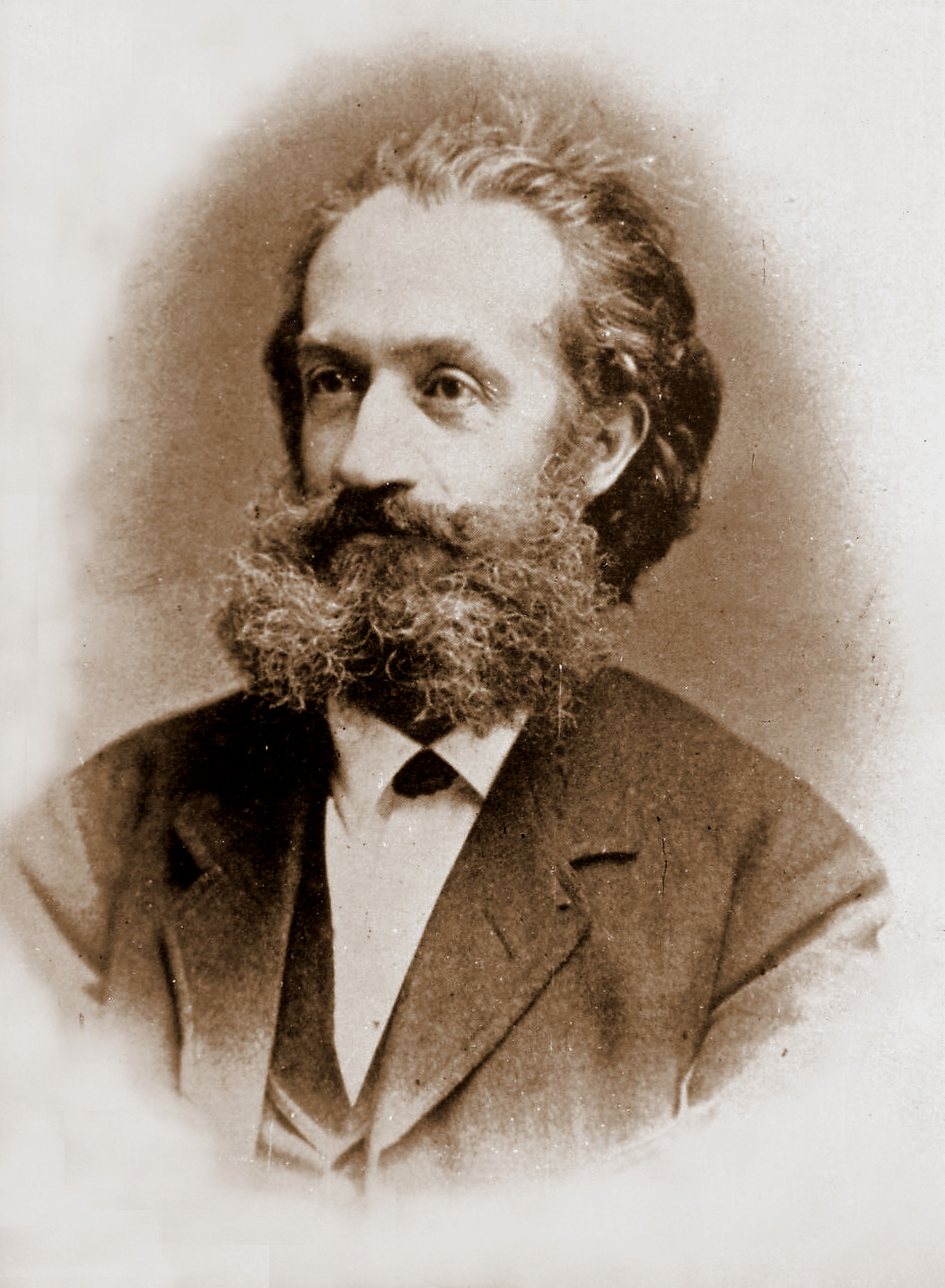 Alexander Ritter (1833-1896) 27. Juni 1833 in Narwa (Estland) † 12. April 1896 in München Violinist, Dirigent und Komponist Der faule Hans (A. Ritter nach Felix Dahn), Oper 1 Akt (1876-1878; 15. Okt. 1885 München, Hofoper) Wem die Krone? (A. Ritter), Oper 1 Akt (1888-1890; 8. Juni 1890 Weimar, Hoftheater)